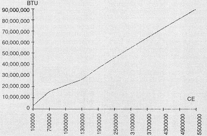 Relacion entre consumo de energia de una refinería y su índice de complejidad